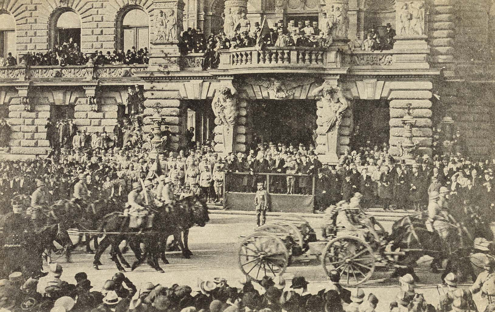 Entrée de la quatrième armée française menée par le général Gouraud à Strasbourg le 22 novembre 1918.